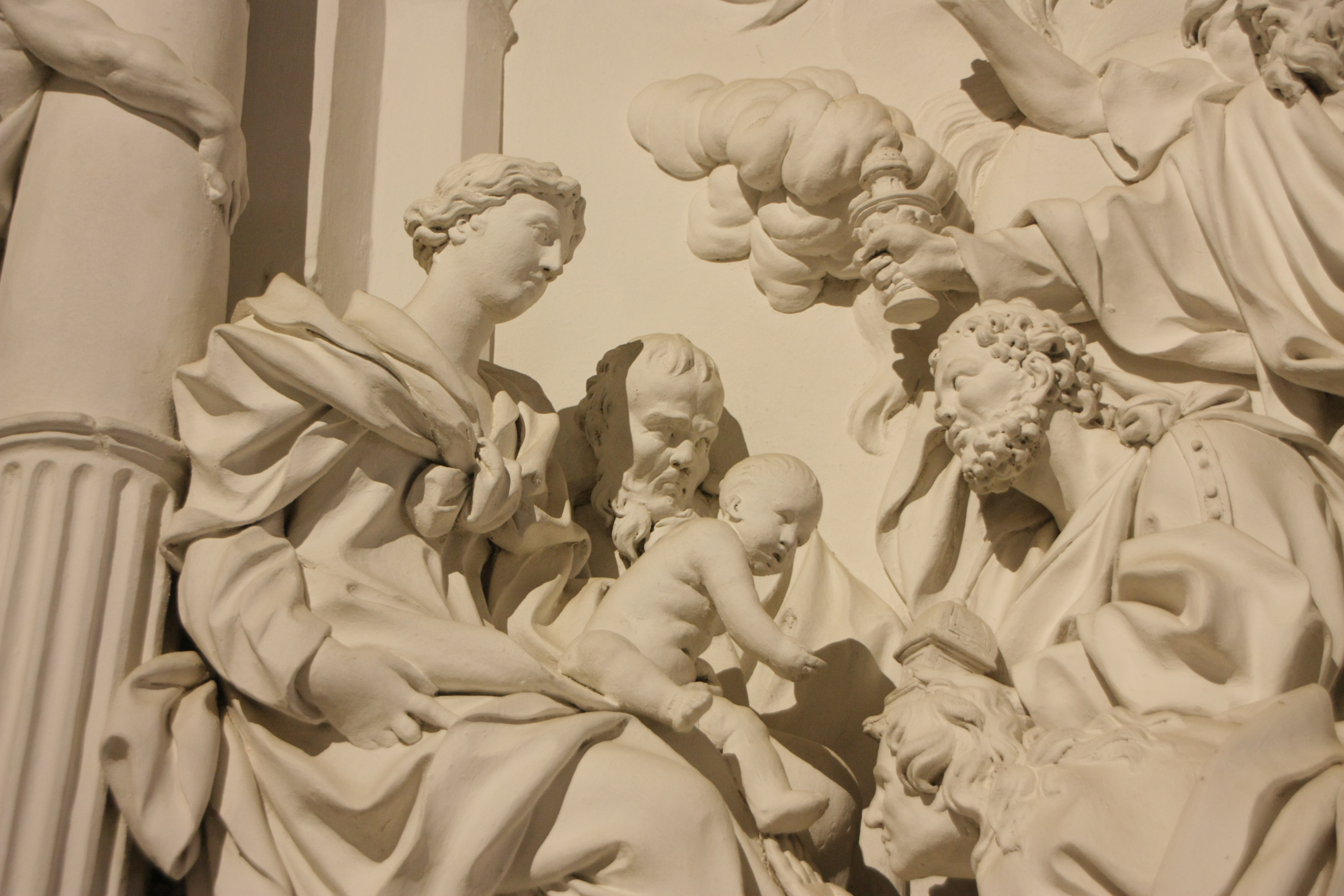 Serpotta e aiuti - Adorazione dei Magi, (1709-1717), stucco